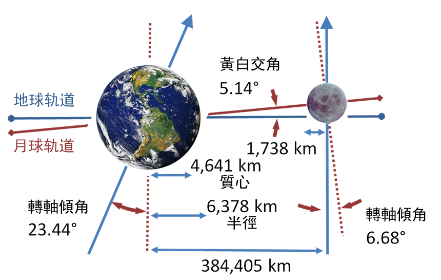 地球與月球的軌道及傾角數據（原圖出自NASA）